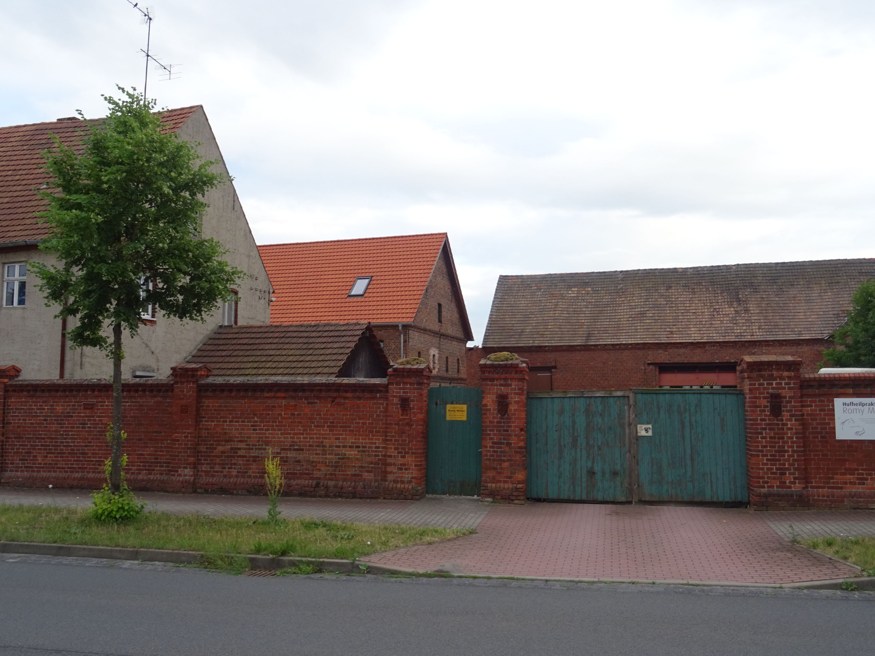 Holzdorf (Elster), Stadt Jessen, denkmalgeschützt eHofanlage Hauptstr. 83